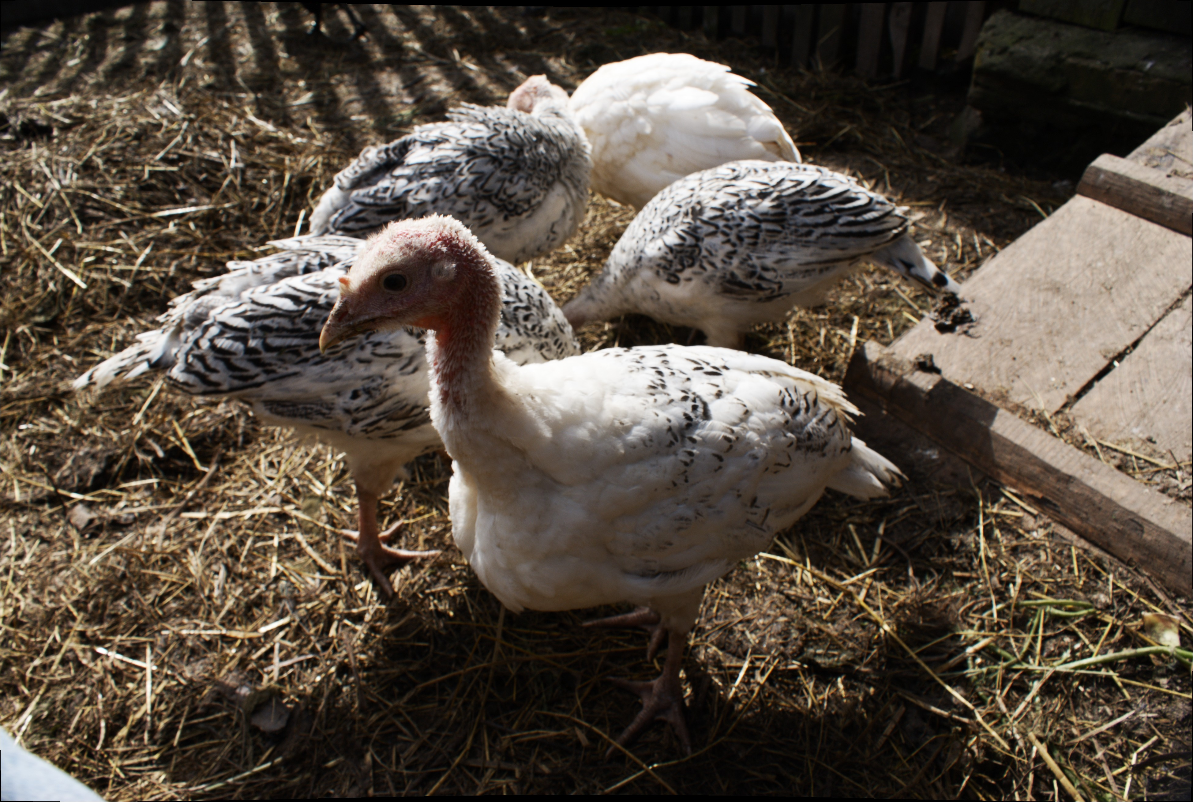 Индюшата собирают пищу (возраст 3 месяца).